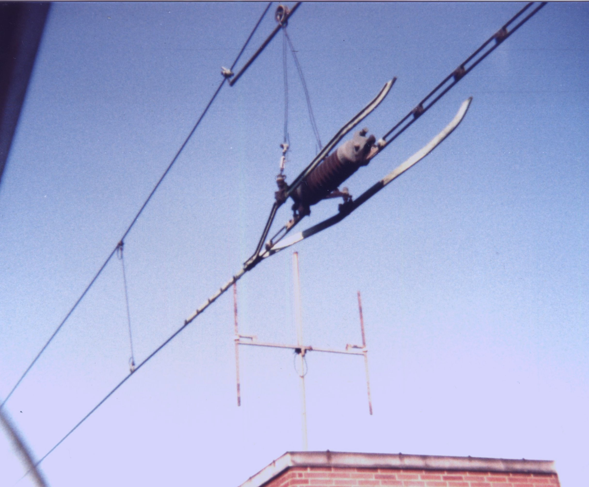 Streckentrenner mit Isolator, am Ablaufberg im Rangierbahnhof Mannheim. (RMR) Scan vom Bild, ohne Datumsangabe.